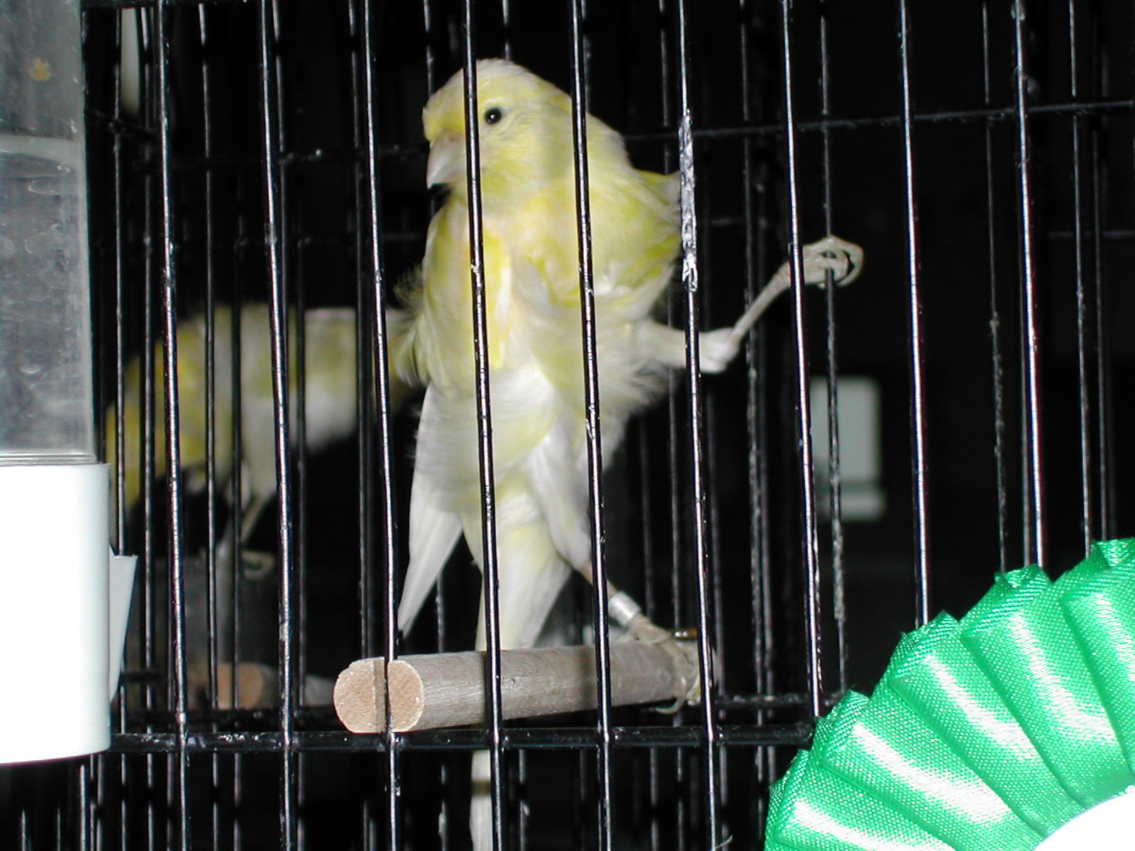 Canarino di forma e posizione